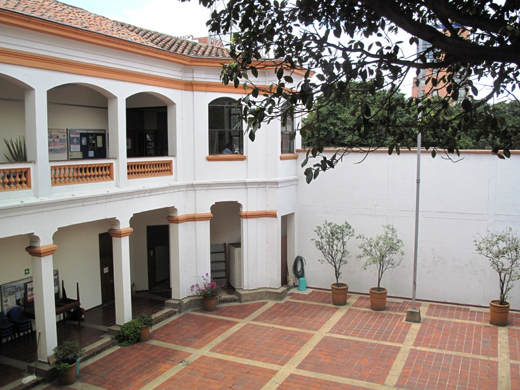 Edificio P